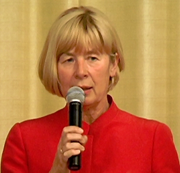 Barbara Rinke, Oberbürgermeisterin der Stadt Nordhausen und 2003–2009 Präses der Synode der Evangelischen Kirche in Deutschland (EKD) (hier bei der EKD-Synode vom April/Mai 2009 in Würzburg, Deutschland).